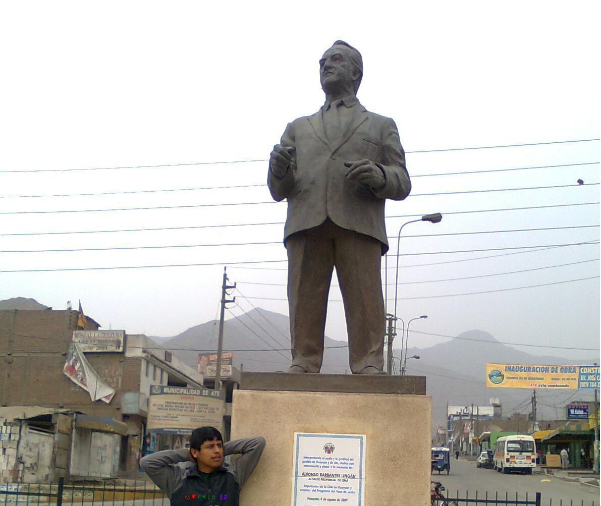 Primer monumento al ex-alcalde Alfonso Barrantes erigido en el distrito de Ate en Huaycán. Alfonso Barrantes Lingán